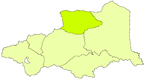 carte schématique des fenouilèdes ds les PO